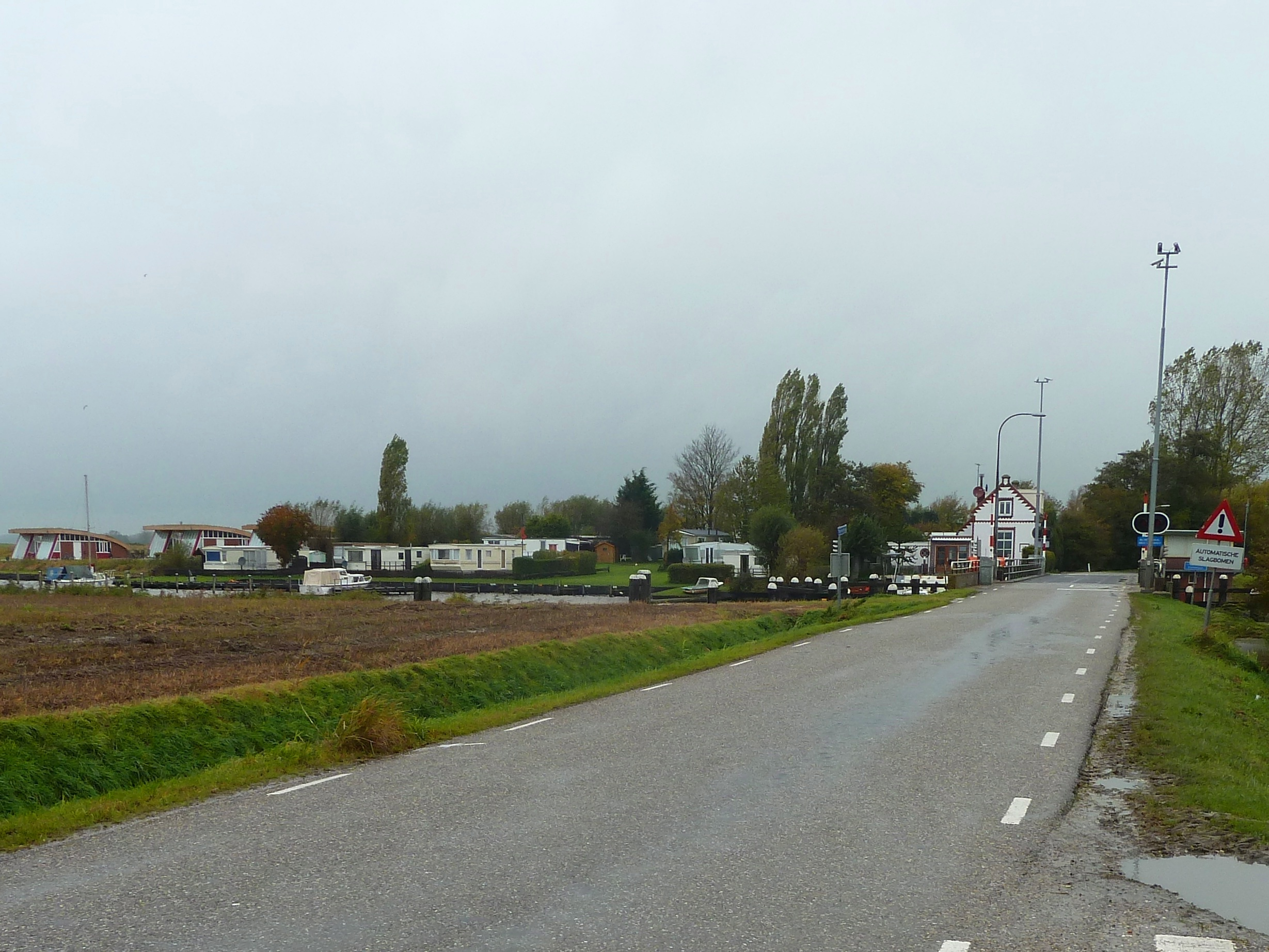 De draaibrug, het brugwachtershuisje, de camping en grasdakwoningen bij Roodehaan.